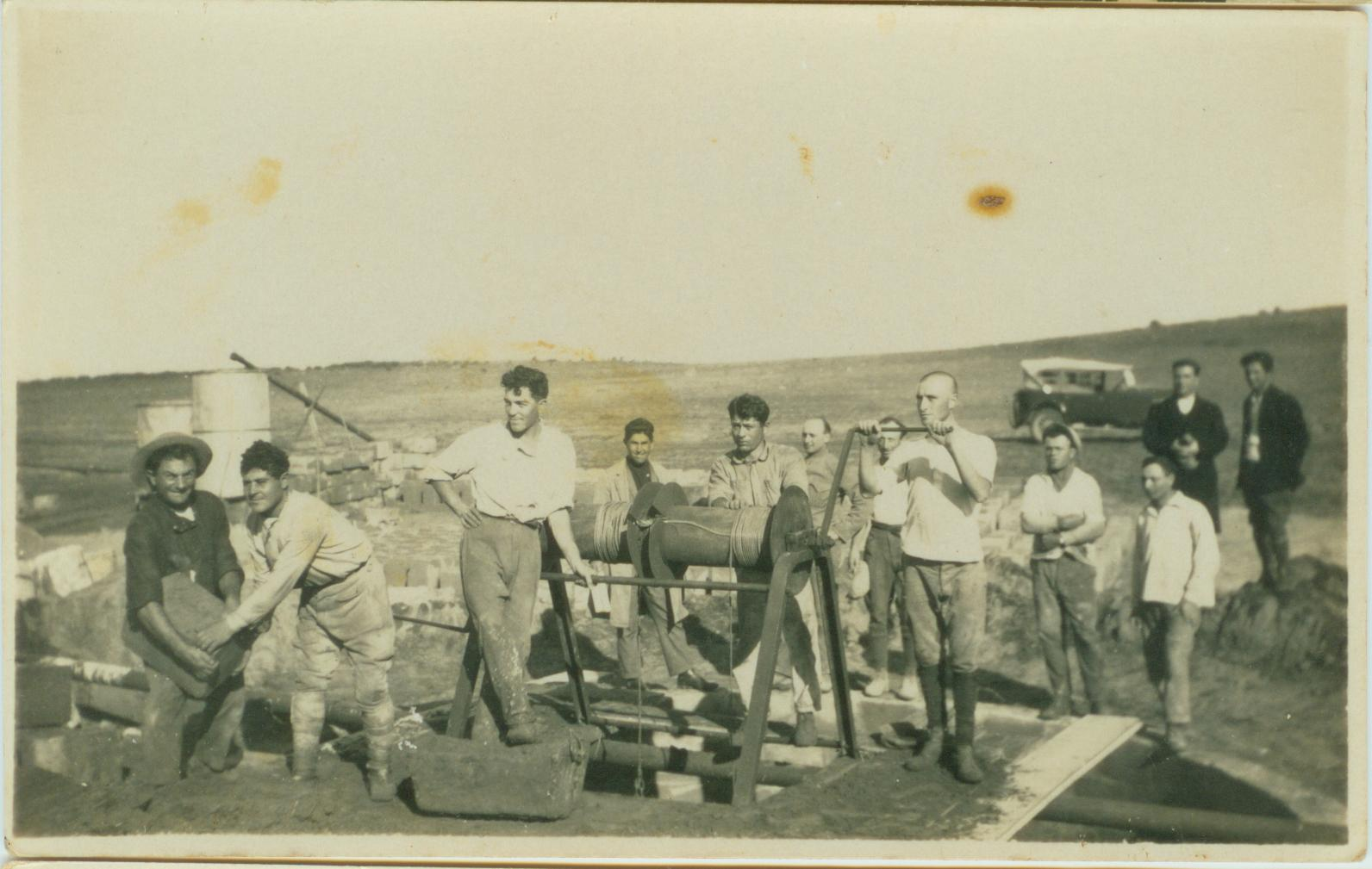 קידוח הבאר הראשונה, באר א' עם העליה על הקרקע